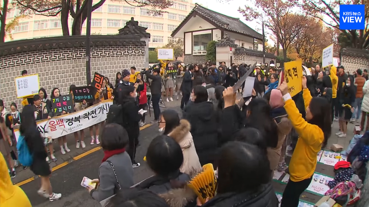 2016년 대학수학능력시험 수험생들 응원